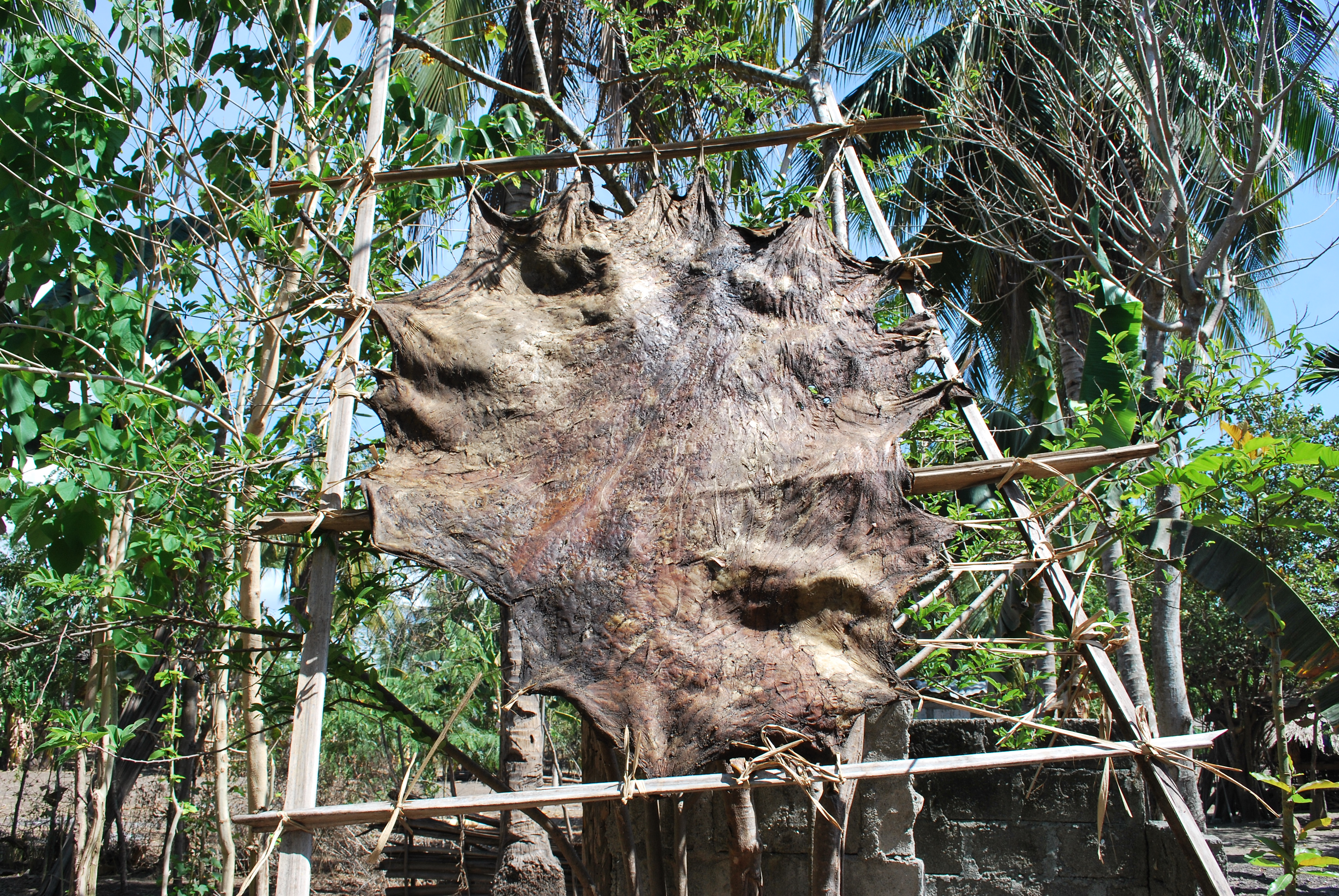 Ledertrocknung in Suai